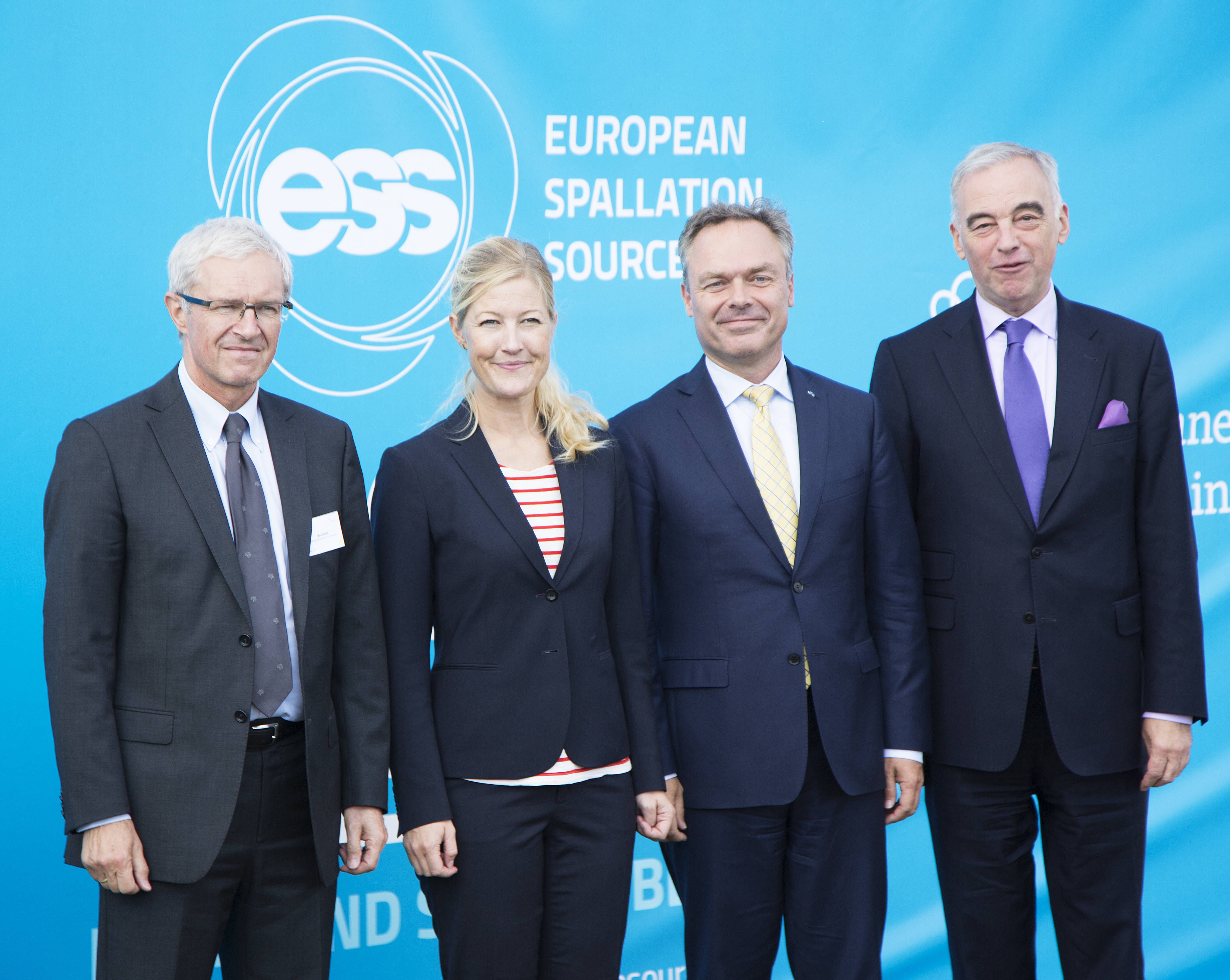 Från vänster: Bo Smith, Danmarks chefsförhandlare för European Spallation Source (ESS), Danmarks utbildnings- och forskningsminister Sofie Carsten Nielsen (Radikale Venstre), Sveriges dåvarande utbildningsminister Jan Björklund (Folkpartiet) samt Sveriges chefsförhandlare för ESS, Lars Leijonborg, vid ceremonin för det första spadtaget inför bygget av neutronforskningsanläggningen på Brunnshög strax norr om Lund, 2 september 2014. Foto: News Øresund - Anna Palmehag © News Øresund(CC BY 3.0) Detta verk av News Øresund är licensierat under en Creative Commons Erkännande 3.0 Unported-licens (CC BY 3.0). Bilden får fritt publiceras under förutsättning att källa anges (Foto: News Øresund + fotografnamn). The picture can be used freely under the prerequisite that the source is given . News Øresund, Malmö, Sweden. News Øresund är en oberoende regional nyhetsbyrå som ingår i projektet Øresund Media Platform som drivs av Øresundsinstituttet i partnerskap med Lunds universitet och Roskilde Universitet och med delfinansiering från EU (Interreg IV A Öresund) och 14 regionala; icke kommersiella aktörer.